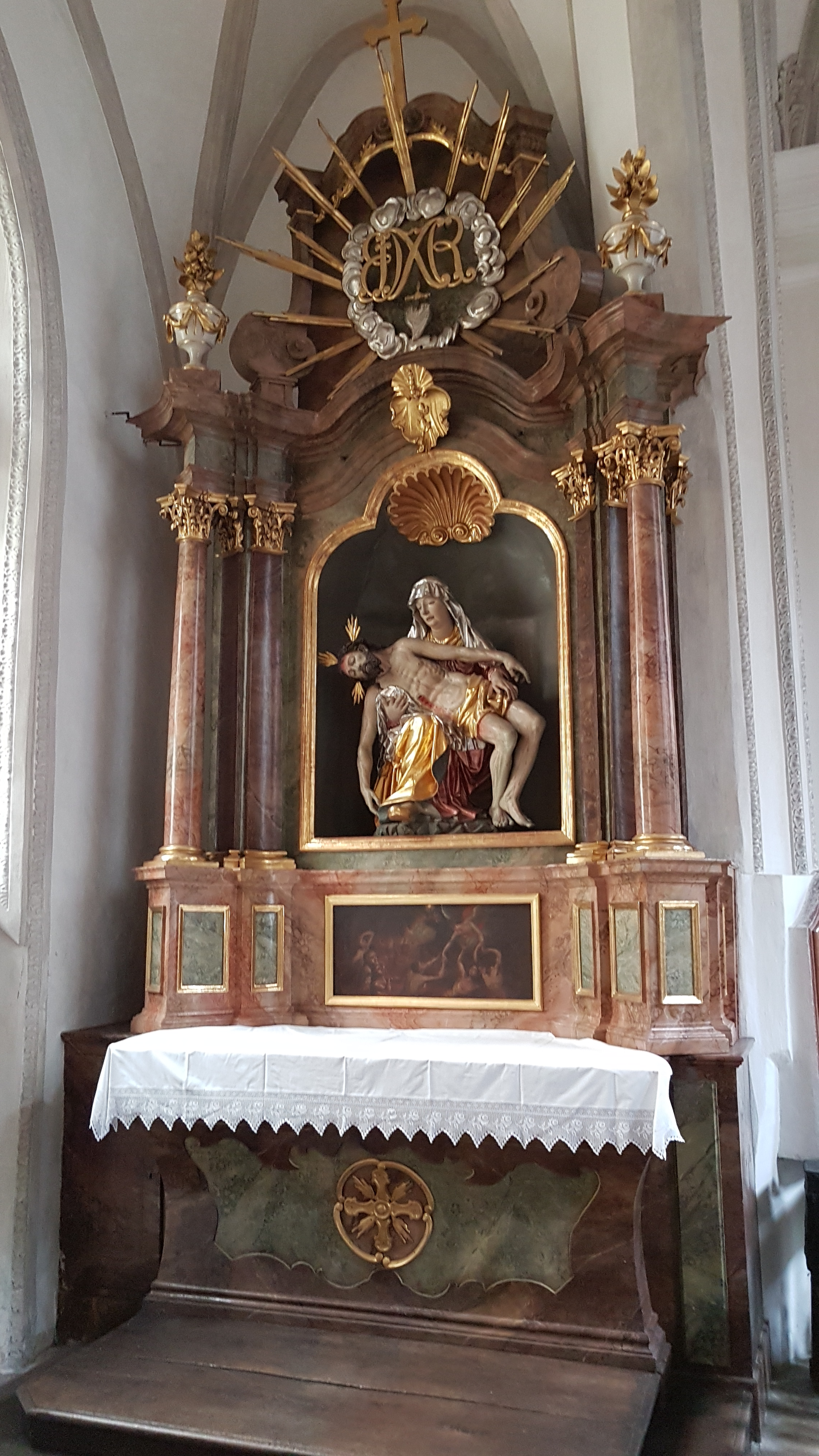 Mariä Himmelfahrt (Landsberg am Lech), 3. linker Kapellenaltar von hinten.